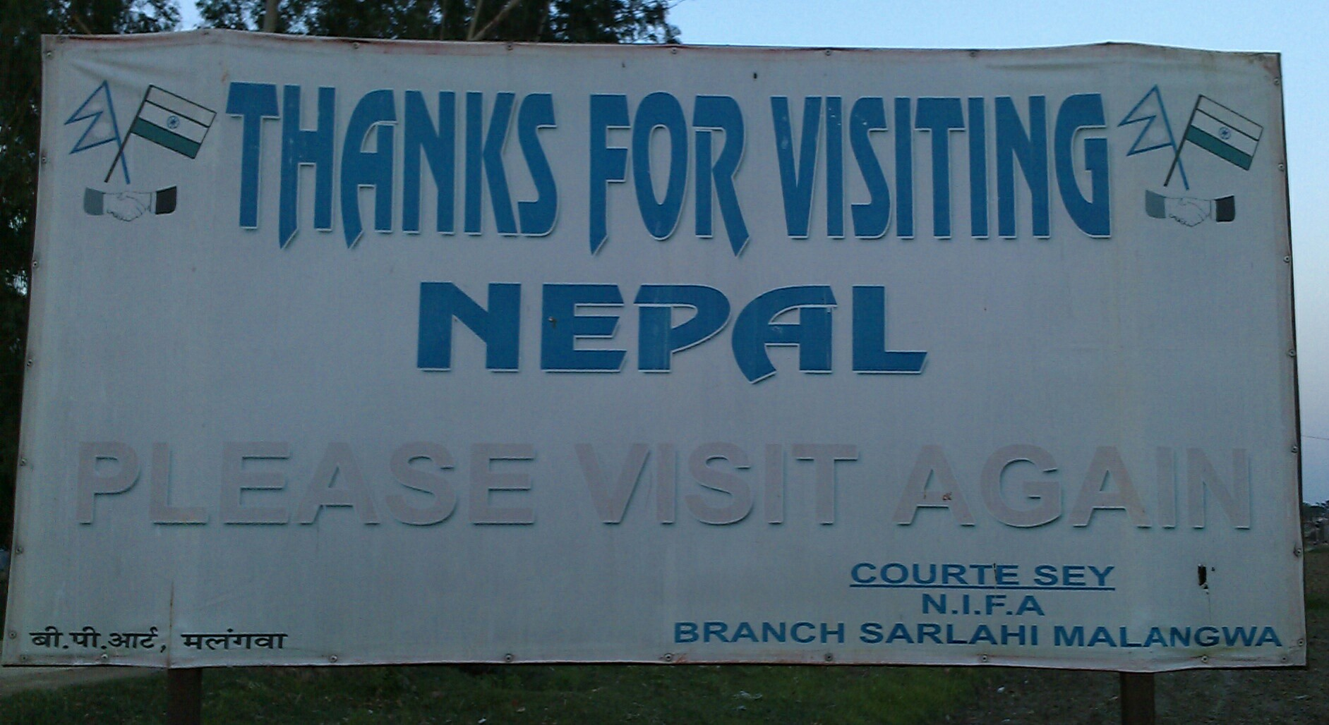 Malangwa border view